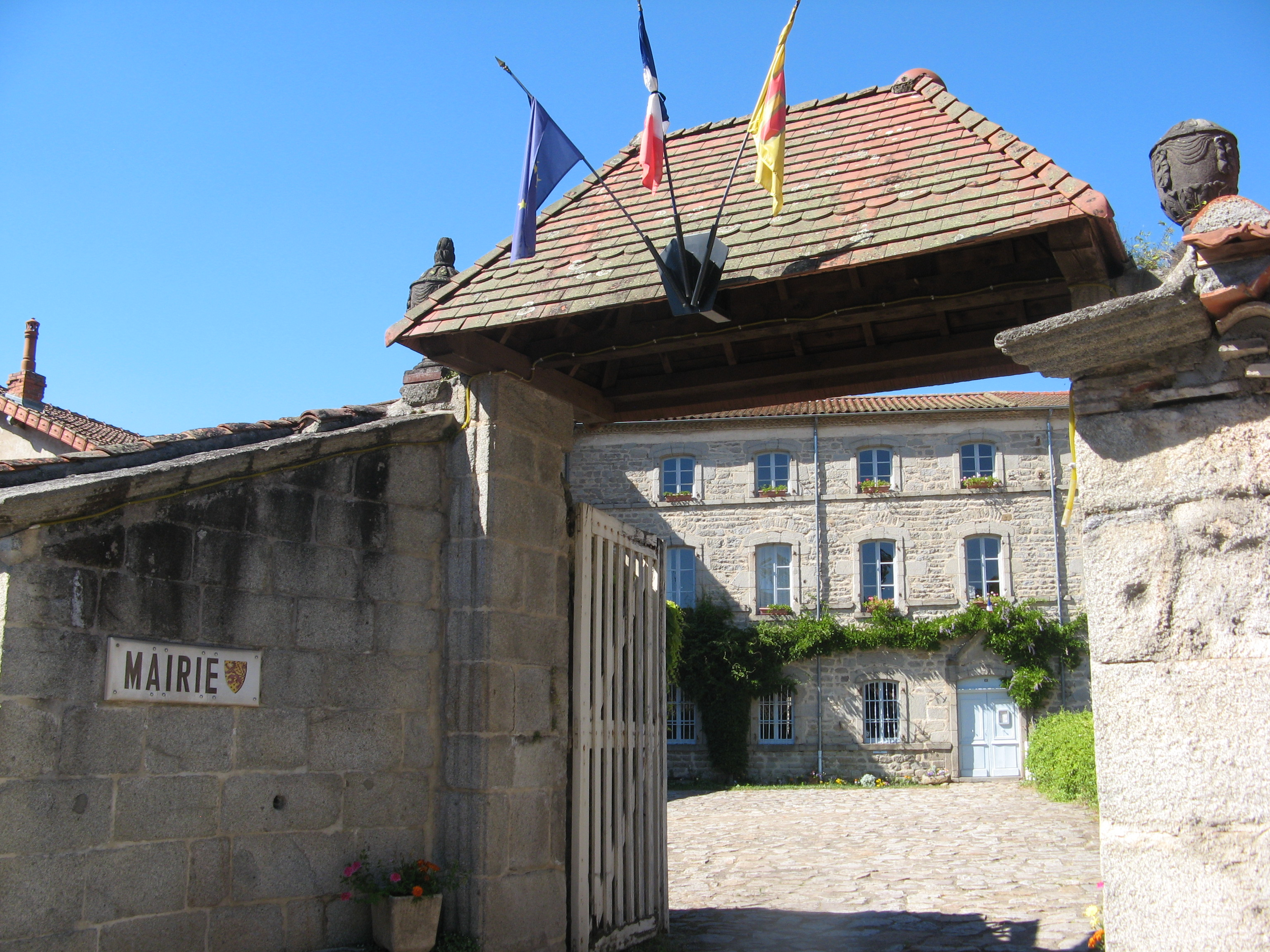 Saint-Dier-d’Auvergne, mairie dans l'ancien hôtel de Costilhes .